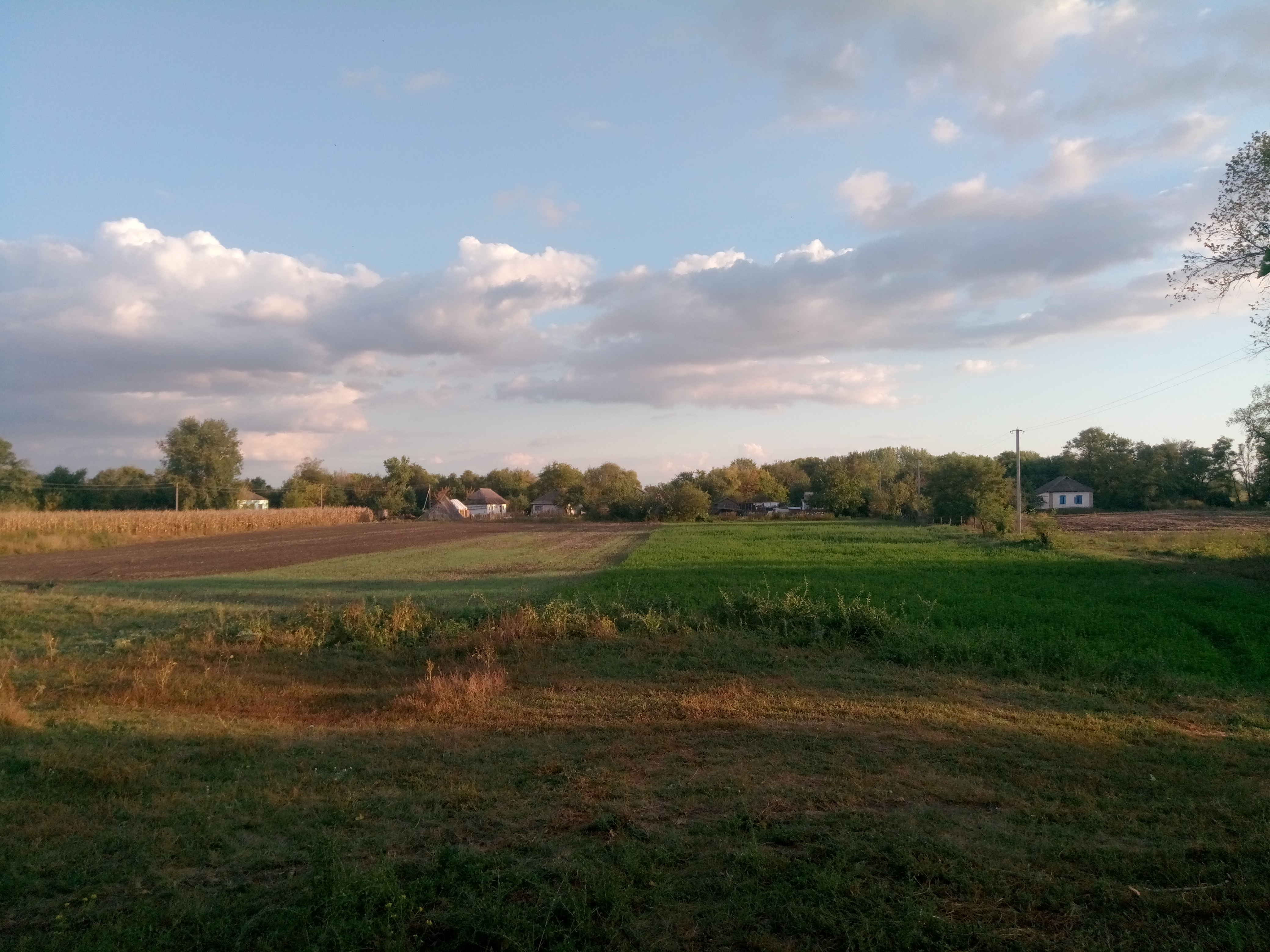 Вид на хати у селі